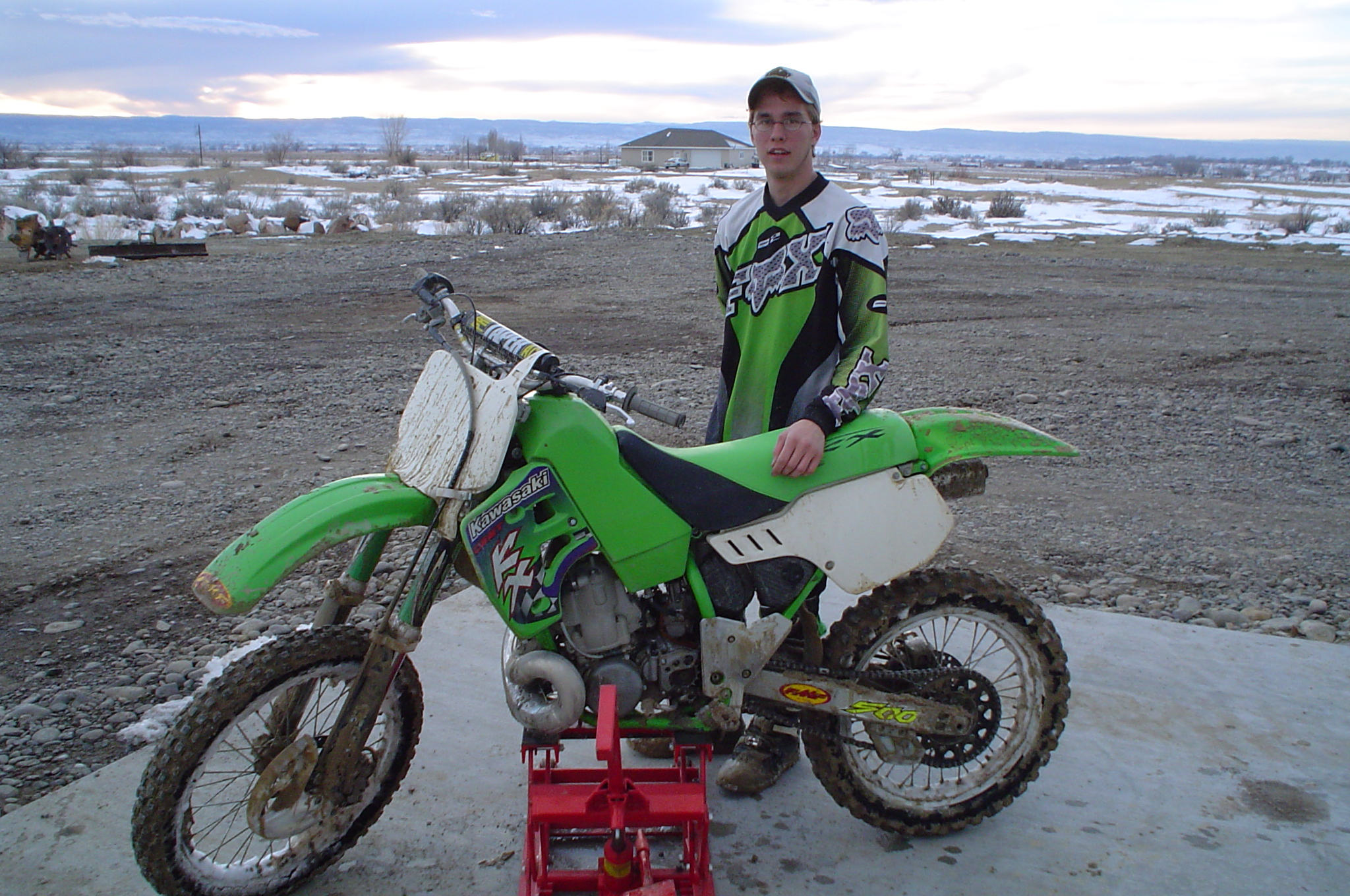 Riding my friends KX 500